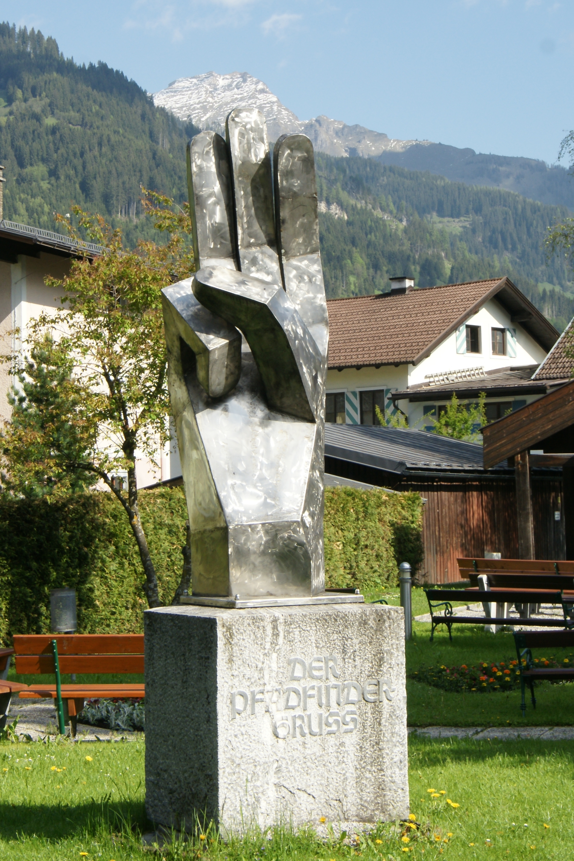 Das Handzeichen zum Pfadfindergruß Gut Pfad. Gesehen in einem Park in Großarl.